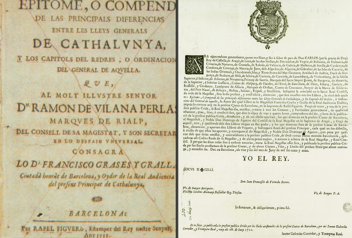 "Epítome o compendi de las principals diferèncias entre las lleys generals de Catalunya y los capítols del redrès o ordinacions del General de aquella, que al molt il·lustre senyor don Ramon de Vilana Perlas, marquès de Rialp, del Consell de sa majestat y son secretari en lo despaig universal, consagra lo doctor Francisco Grases y Gralla, ciutadà honrat de Barcelona y oïdor de la Reial audiència del present principat de Cataluña. Barcelona: per Rafel Figueró, estamper del rey, nostre señor, any 1711"